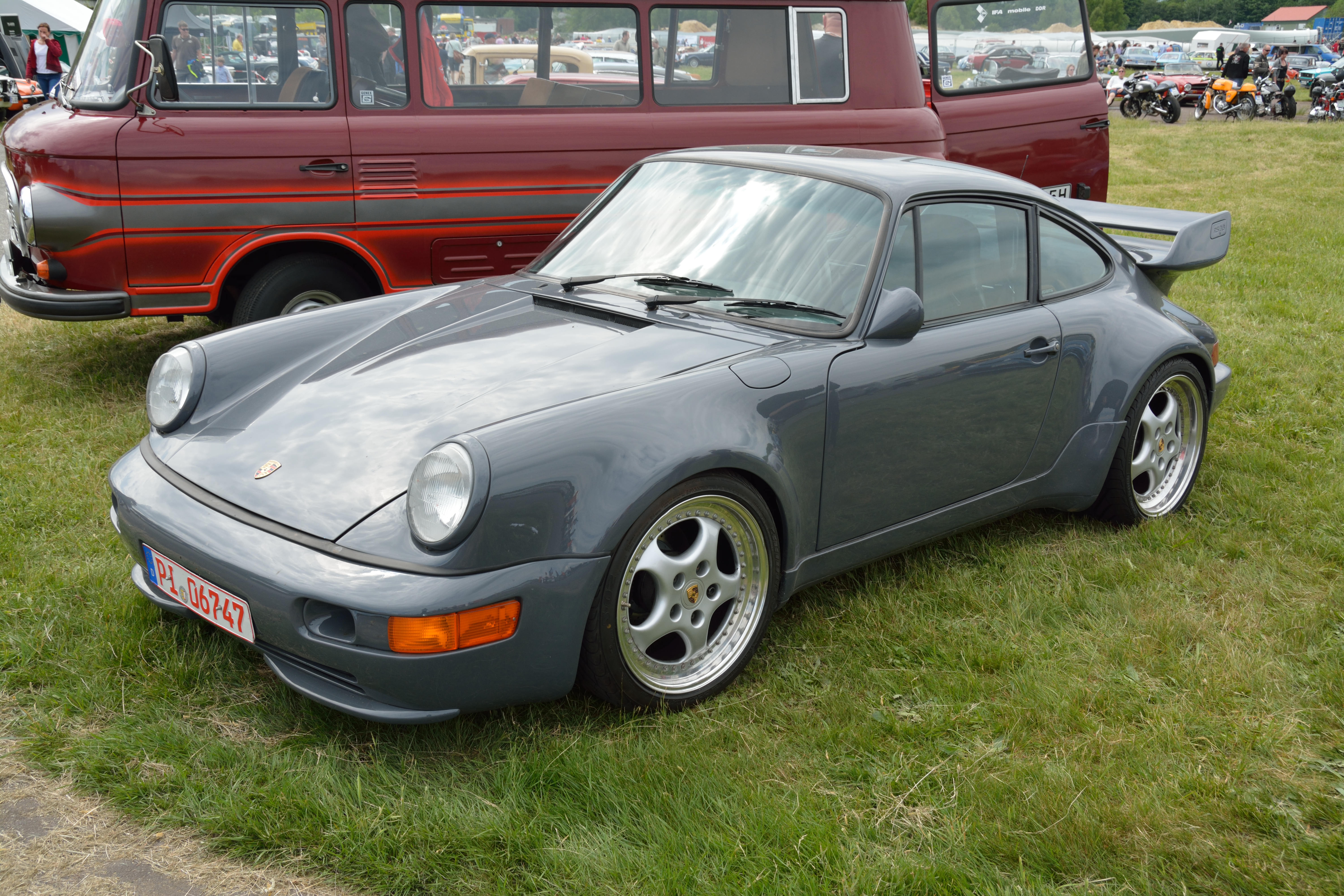 Impressionen der vierten "Classic Motor Days, Oldtimer und historische Fahrzeuge" auf dem Flugplatz Hungriger Wolf Porsche 964 Carrera RS 3.8